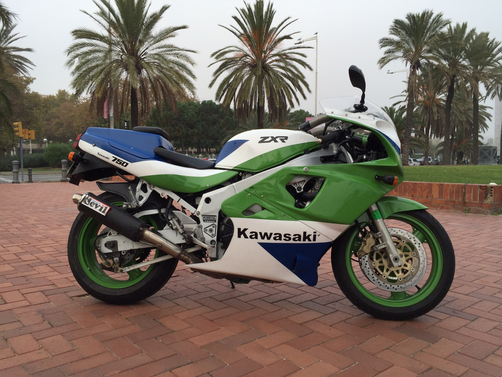 Kawasaki ZXR 750 de 1989 amb carenats i esquema de colors telefónica posteriors